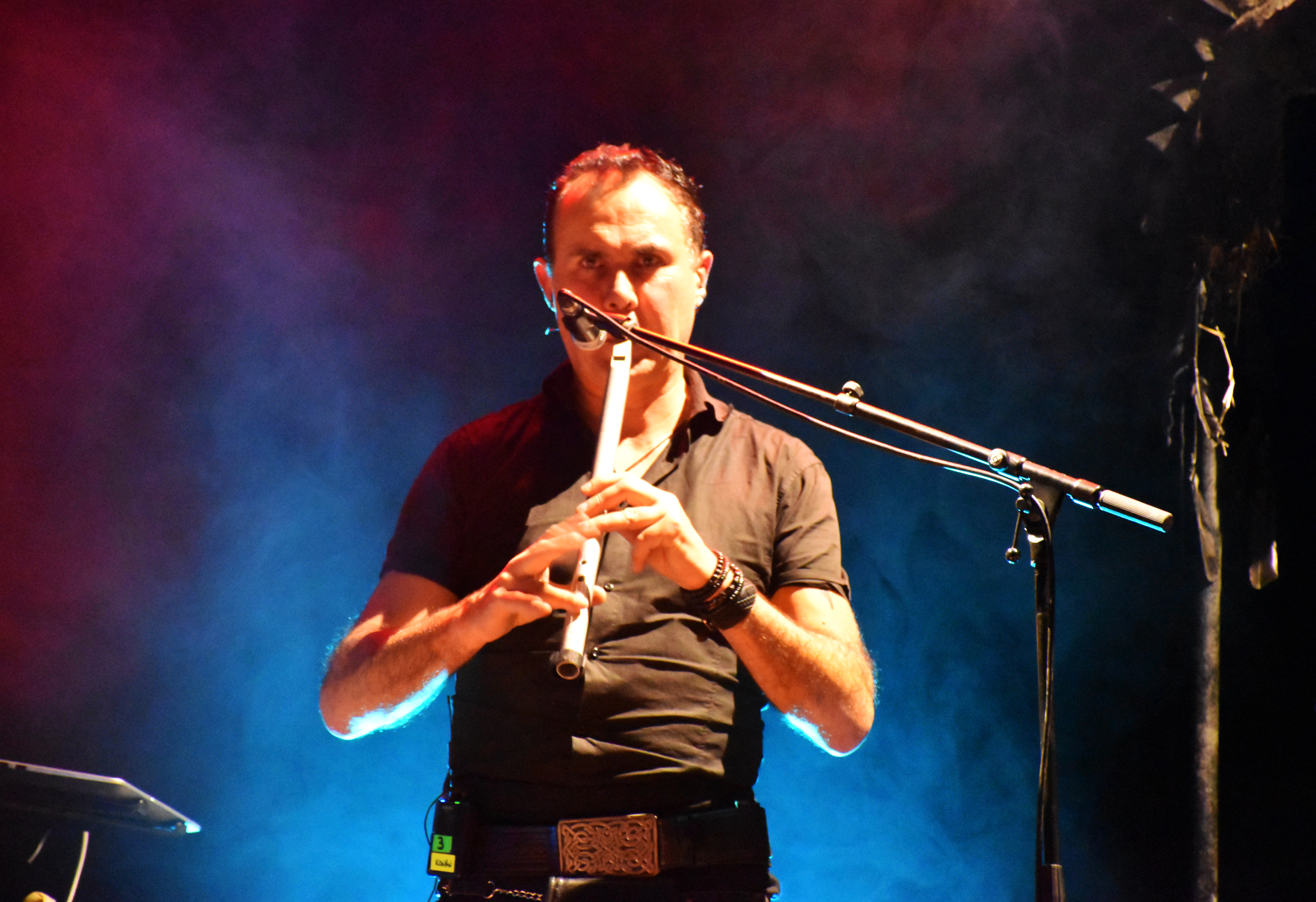 Alan Stivell en concert à Châteaubernard - Le Castel pour la tournée Human~Kelt le 23 novembre 2018.